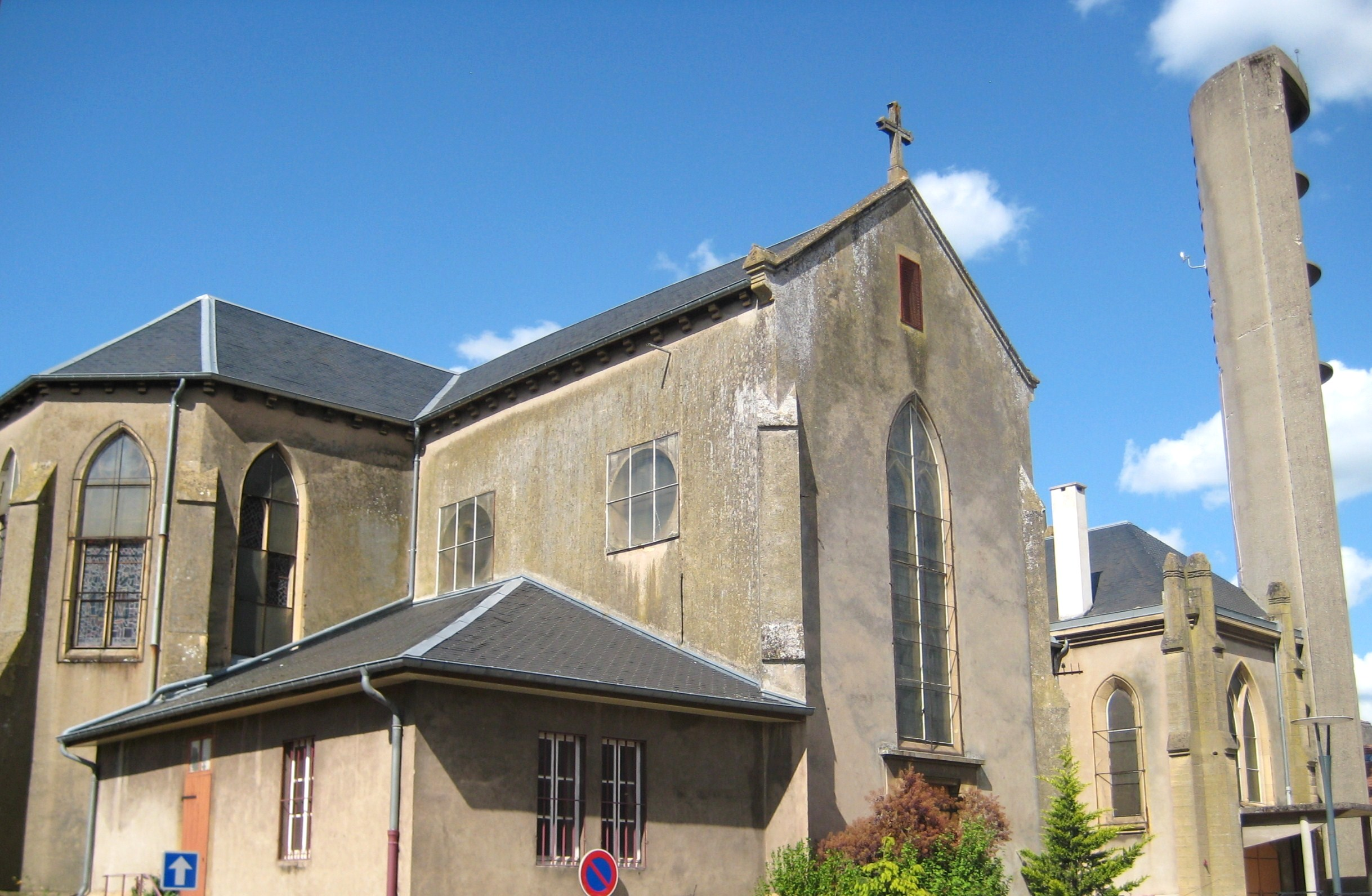 Description Église de l'Exaltation de la Sainte-Croix de JoeufDate 18 May 2009Source mon appareil photoAuthor Aimelaime Église de l'Exaltation de la Sainte-Croix de Joeuf